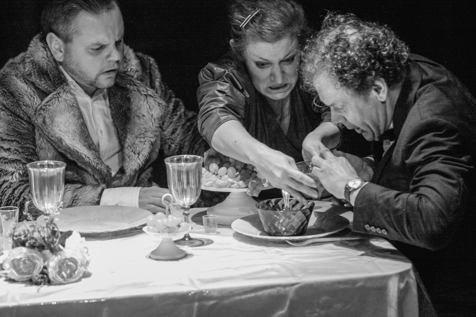 Zdjęcie ze spektaklu Samobójca fot. Tomasz Margol